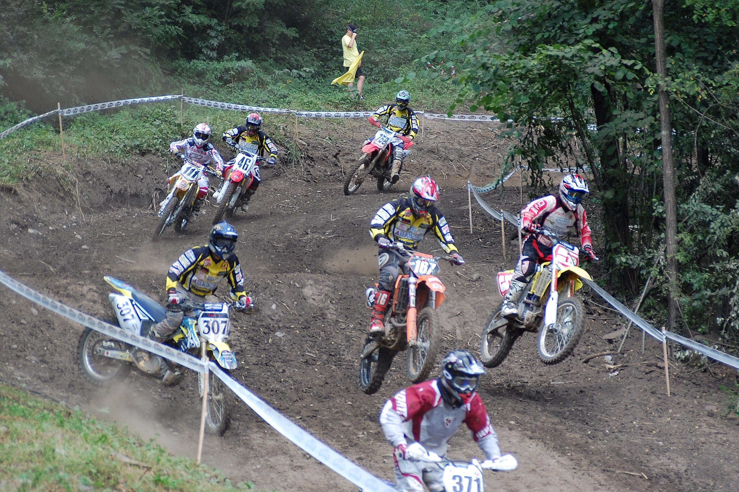 MotoCross da S.Omobono